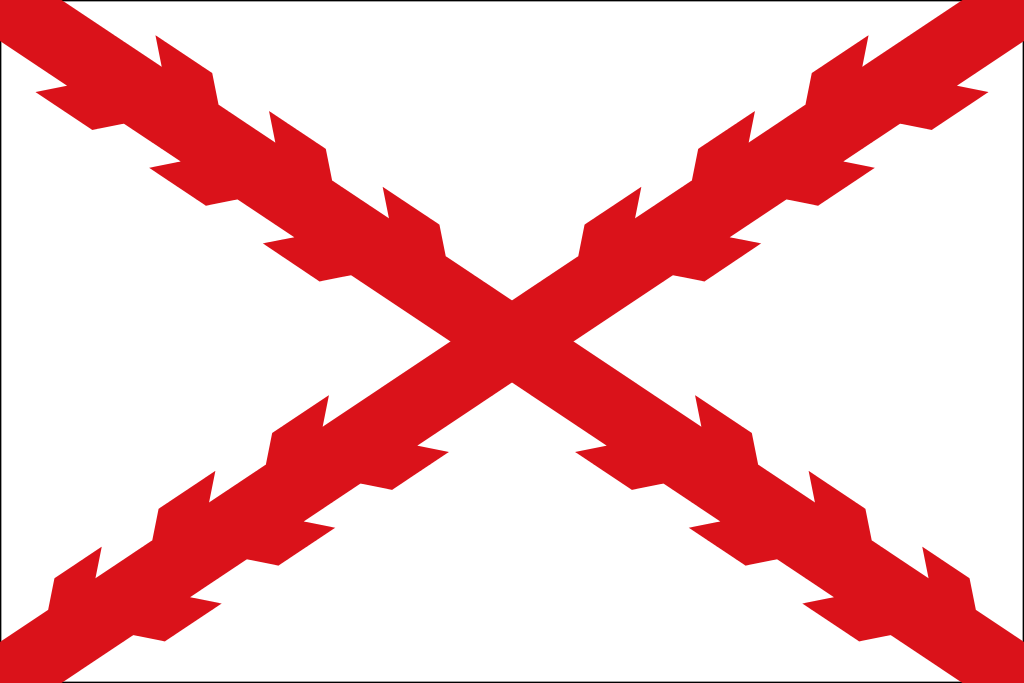 Bandera Imperio Español